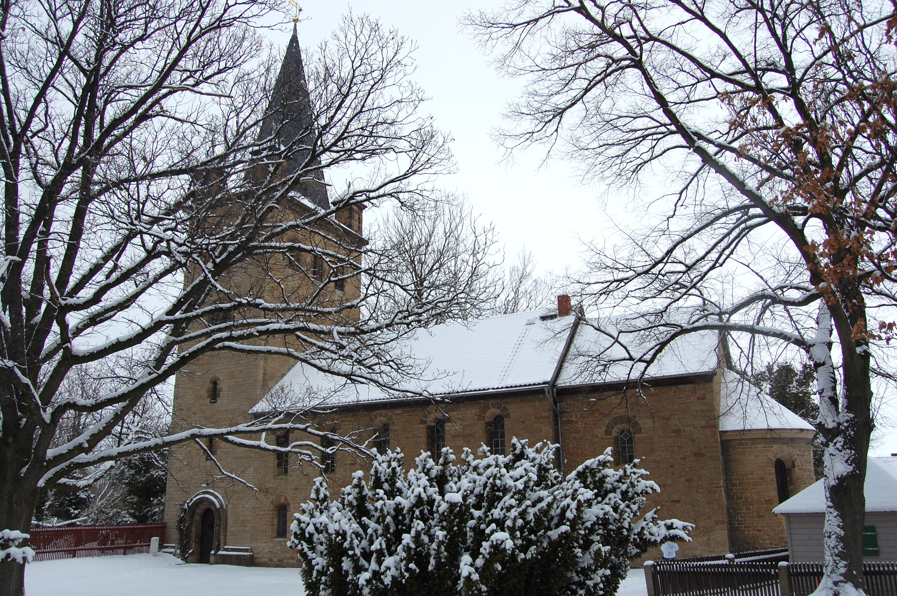 Sankt-Bartholomäus-Kirche in Drübeck, Südseite